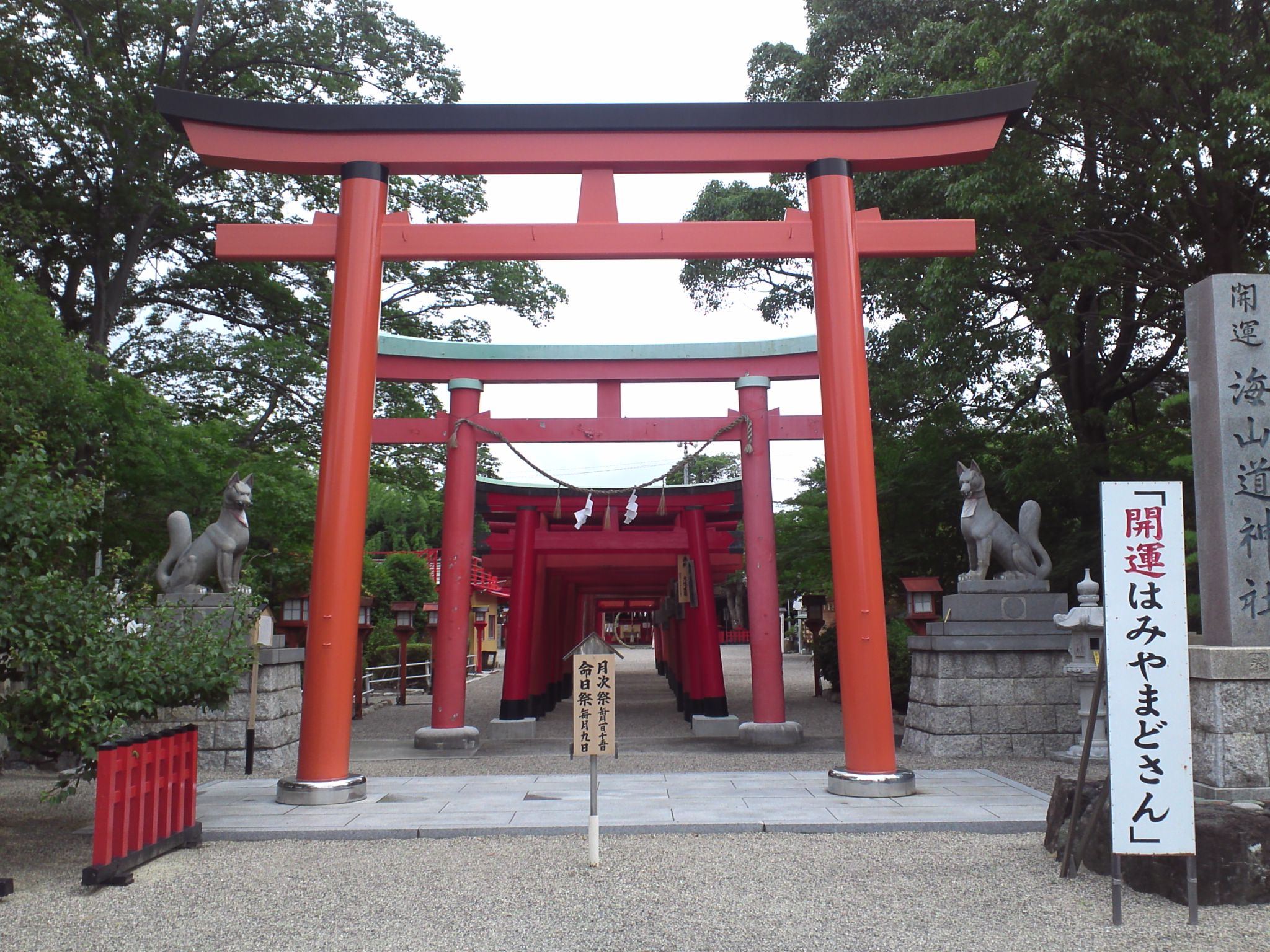 海山道稲荷神社（三重県四日市市）